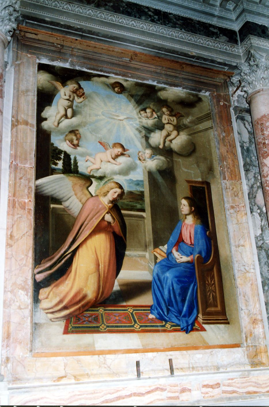 Tela raffigurante l'Annunciazione, dipinta da Giovanni Battista Salvi da Sassoferrato, nella chiesa della Santissima Annunziata di Casperia